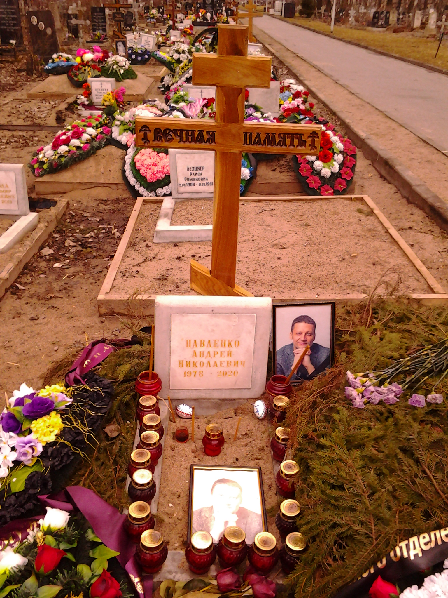 Надгробие А. Н. Павленко (март 2020 года).